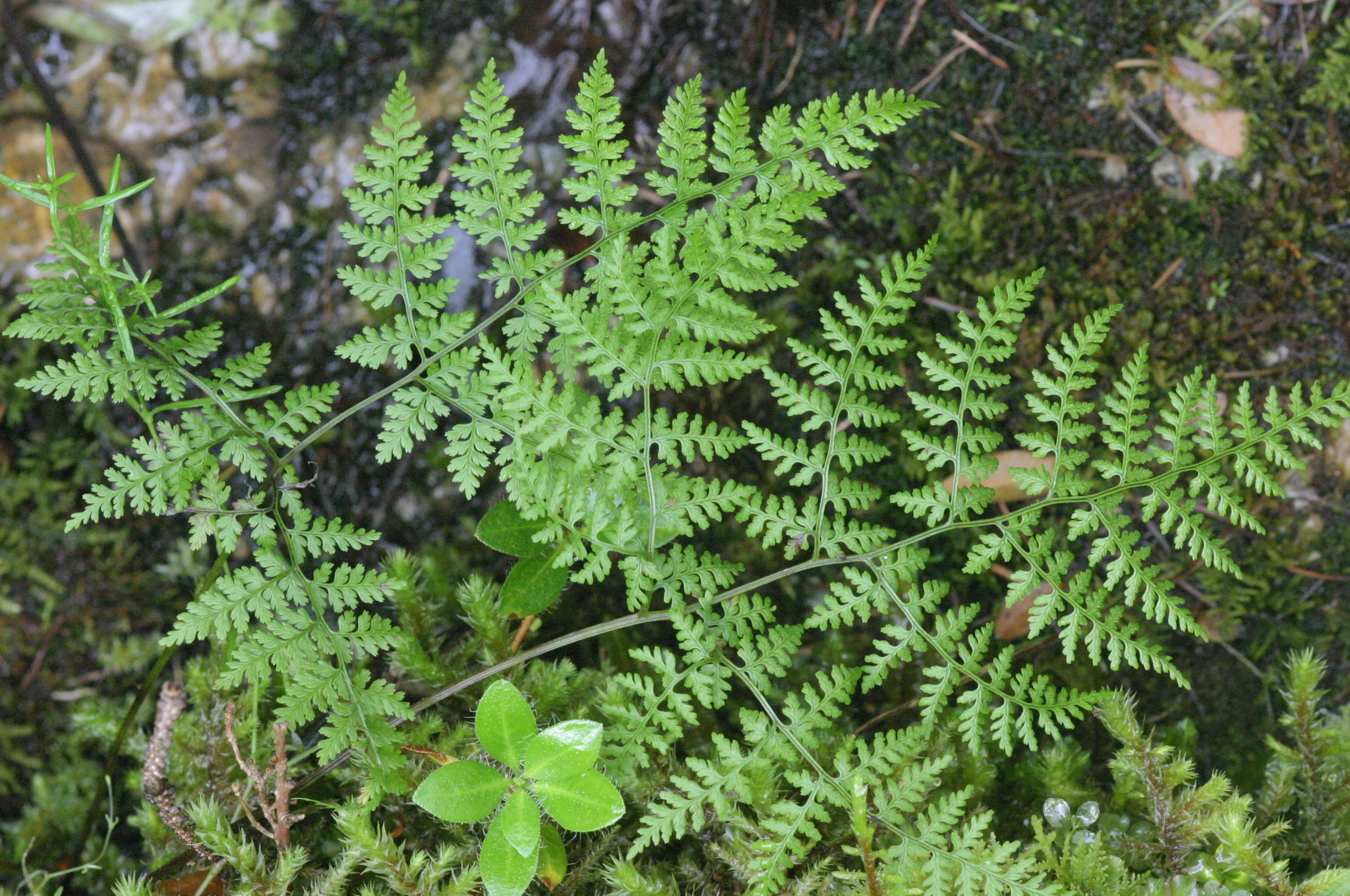 Cystopteris montana (Berg-Blasenfarn) Aufnahmeort: Haindlkar - Gesäuse, Steiermark, Austria